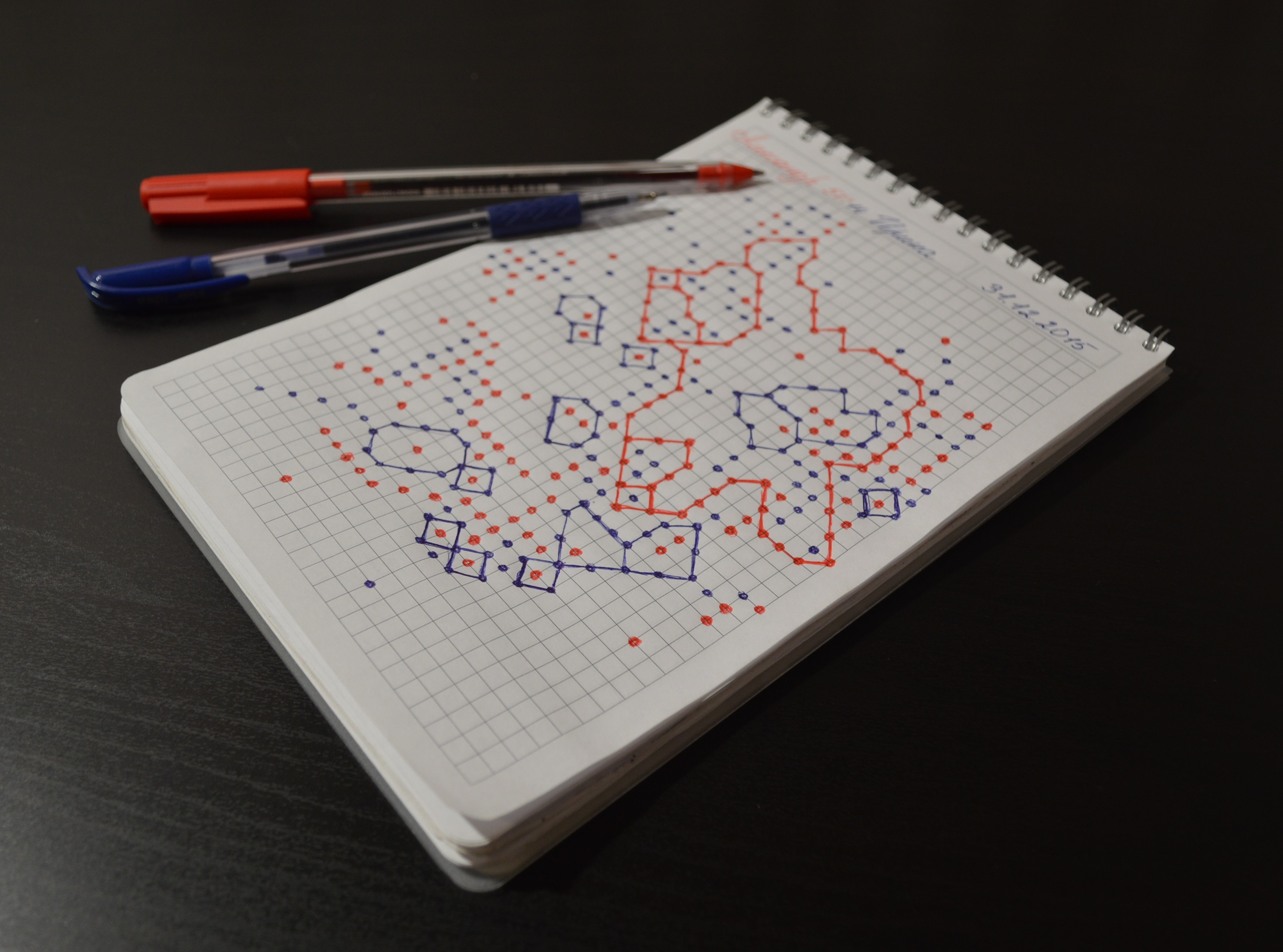 Игра точки. Партия на листе бумаги